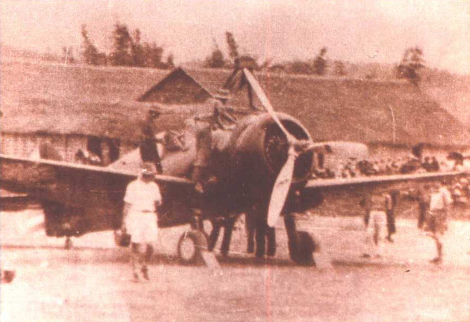 中文（中国大陆）: 雷允飞机制造厂生产的飞机